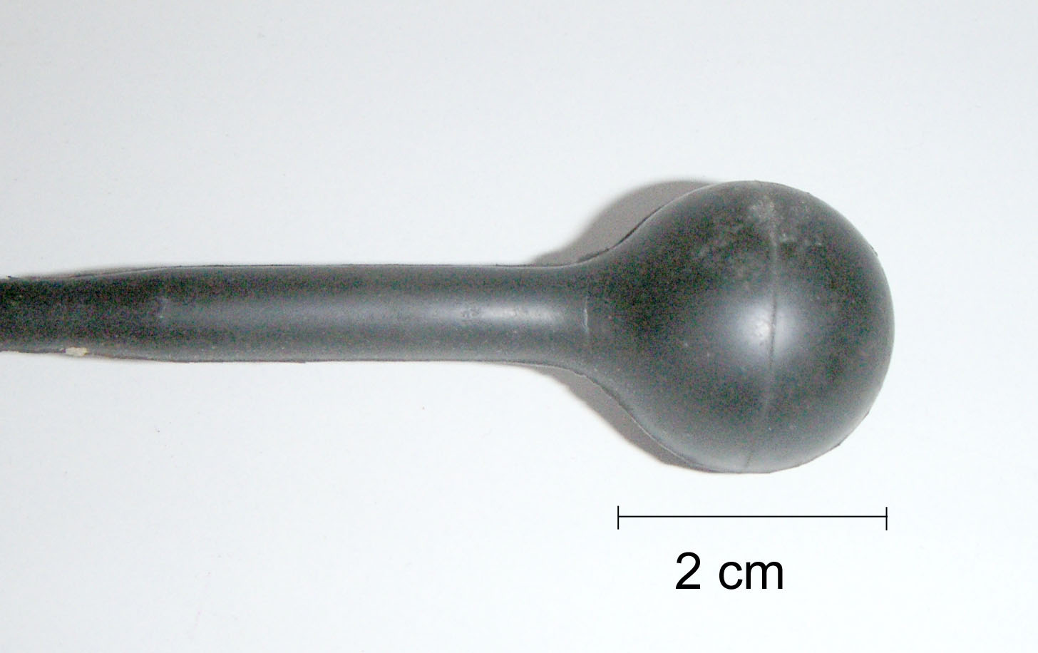 Hydrophone